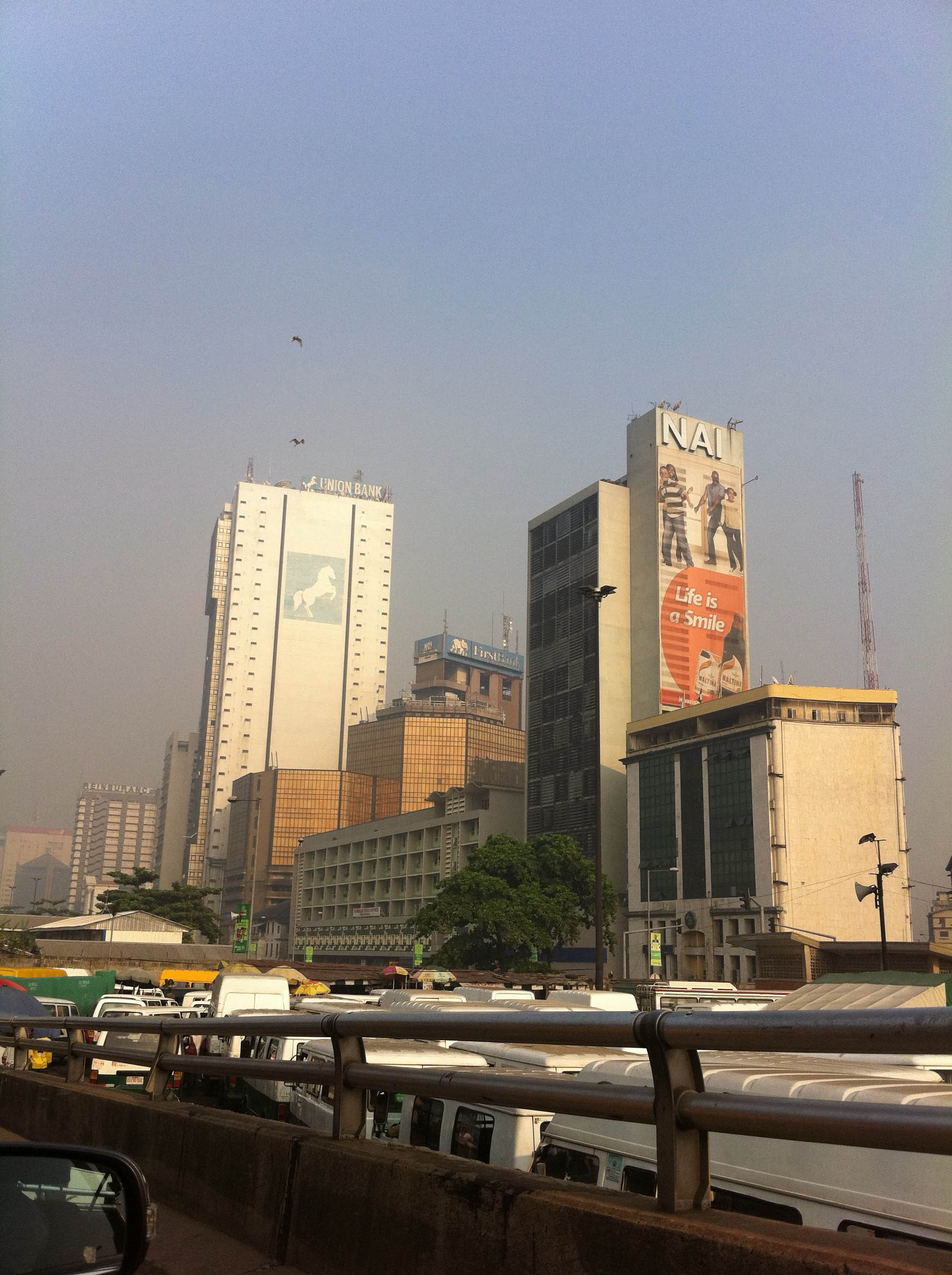 Lagos